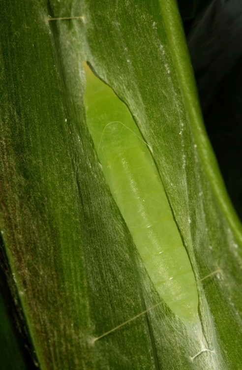 GRASS DEMON Udaspes folus pupa